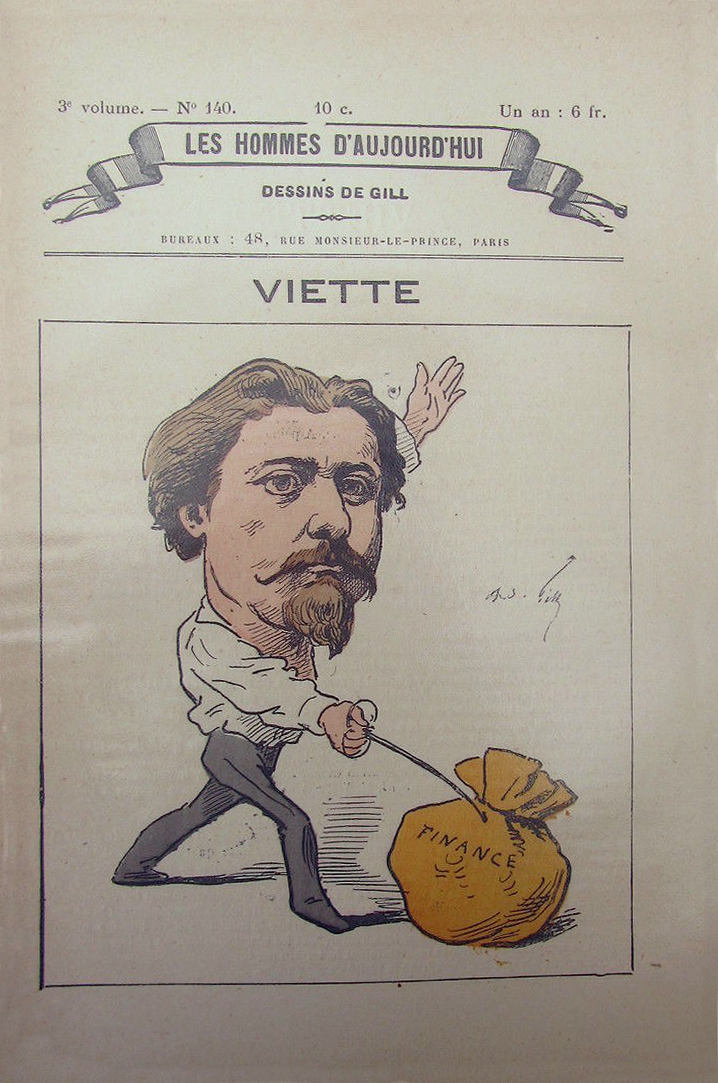 Jules Viette (1843-1894), caricature par André Gill, Les Hommes d'aujourd'hui, n°140, 1880.